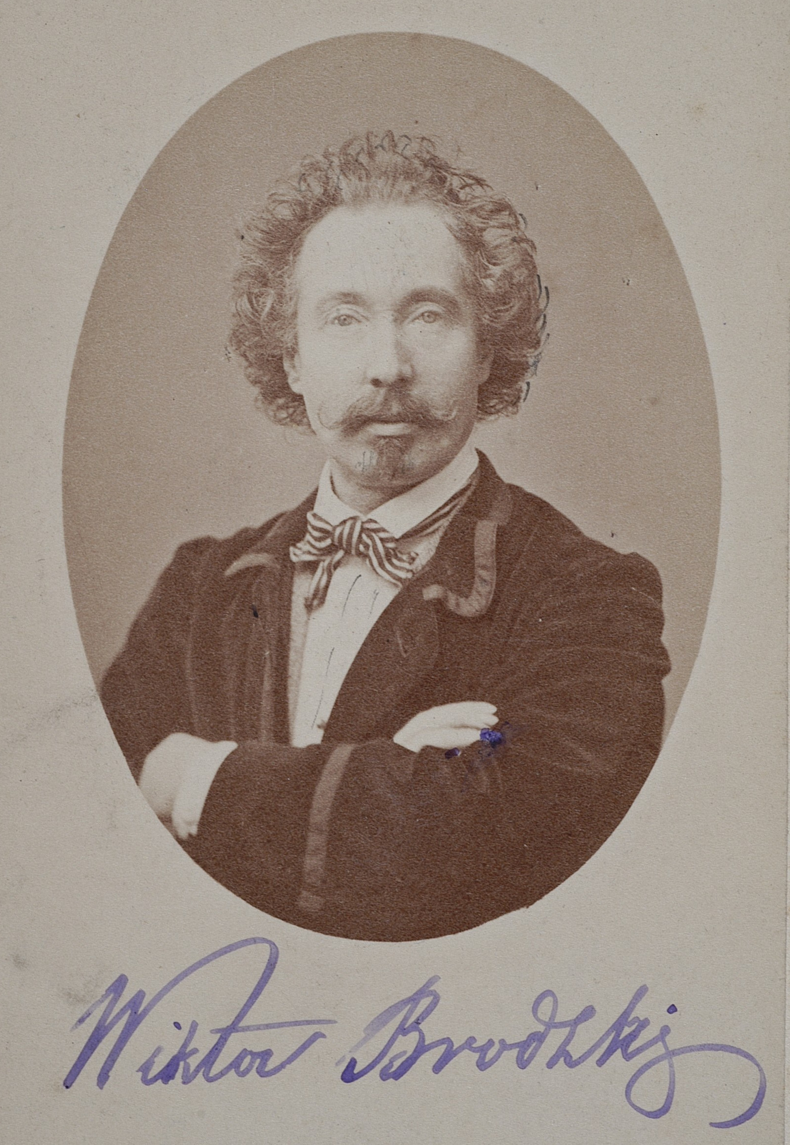 Wiktor Brodzki, 1879 r.